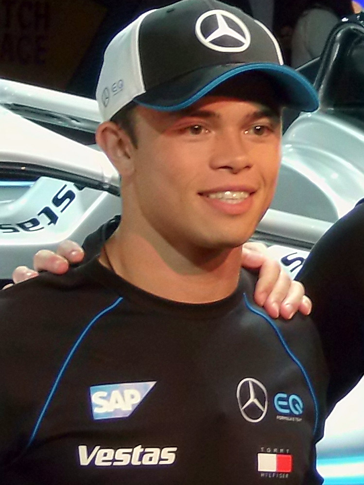 Ian James, Nyck de Vries, Stoffel Vandoorne und Toto Wolff bei der Teampräsentation des Mercedes-Benz EQ Formula E Teams auf der IAA 2019, im Hintergrund der Mercedes-Benz EQ Silver Arrow 01